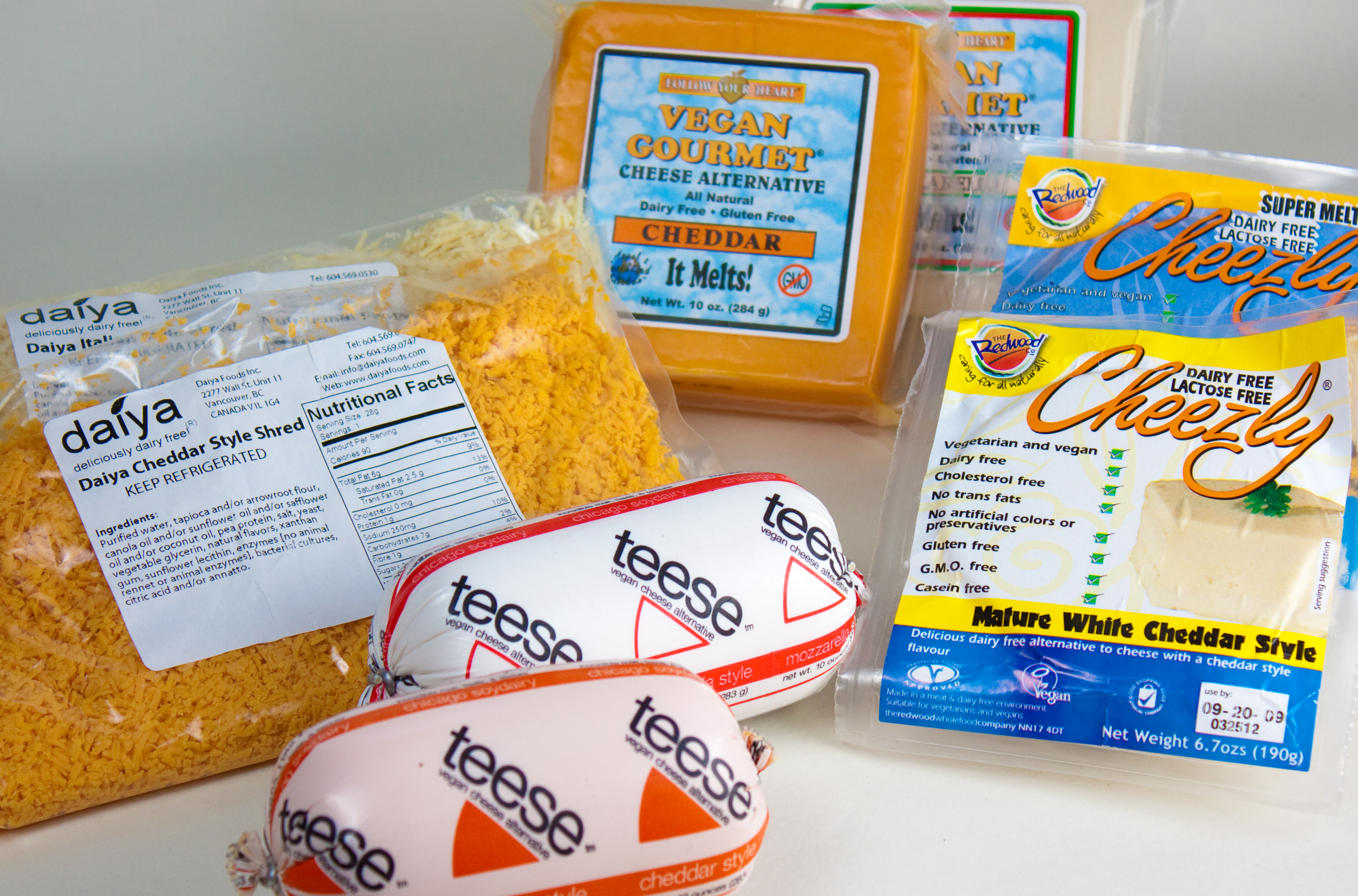 Vegan Cheeses